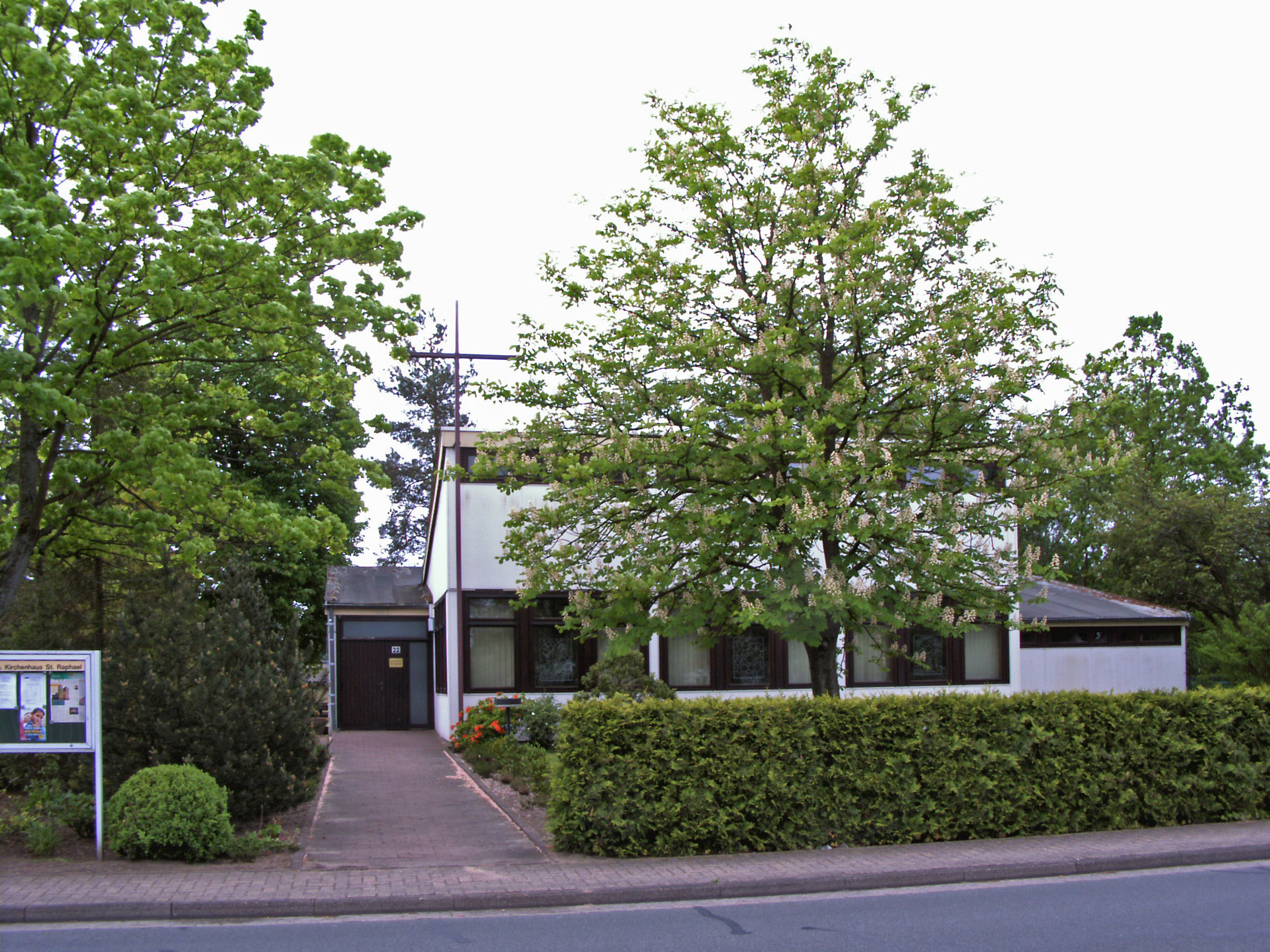 Katholische Kirche St. Raphael in Lachendorf, Landkreis Celle